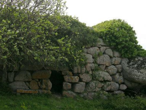 Il Nuraghe Agnu è situato a Calangianus, in località Pascaredda e nell'omonima area archeologica.